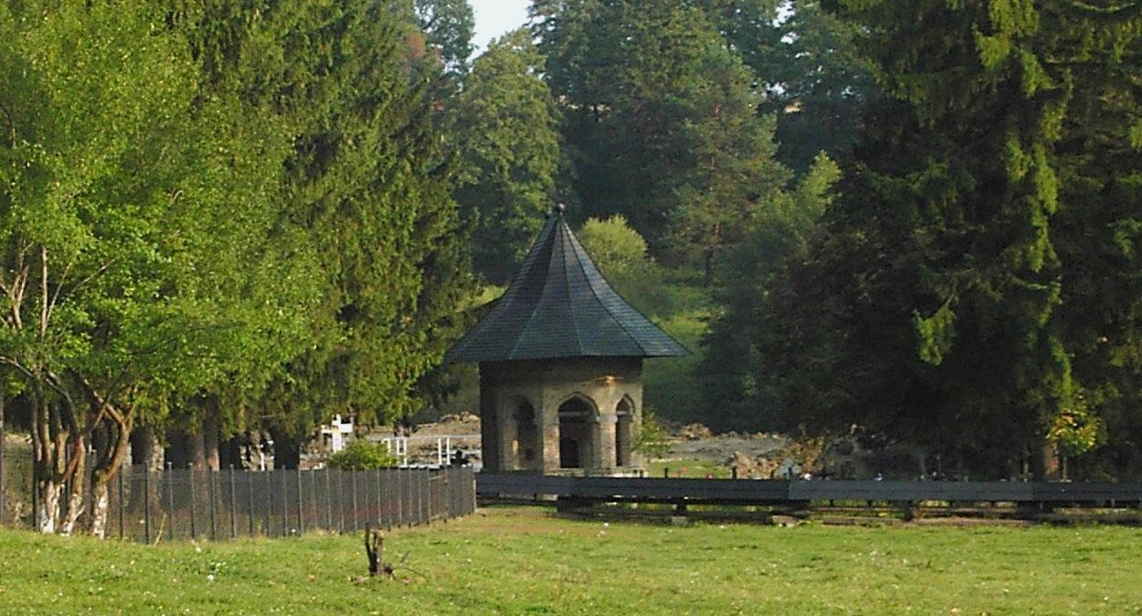 DRAGOMIRNA